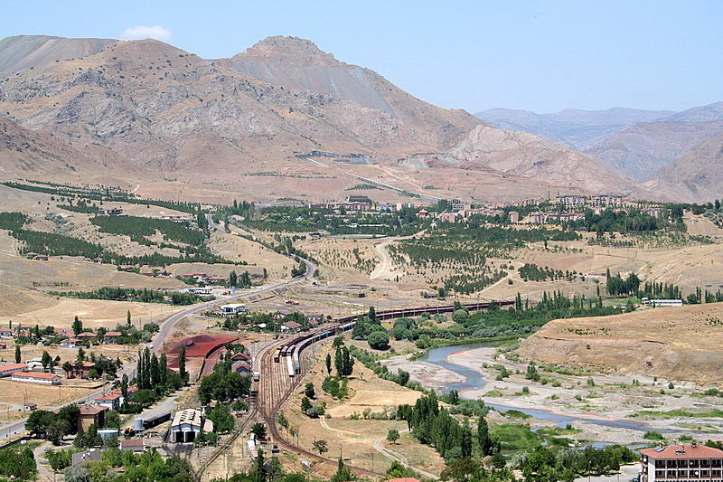 Divriği Demir Madeni; Iron Ore, Divriği, Sivas,Turkey